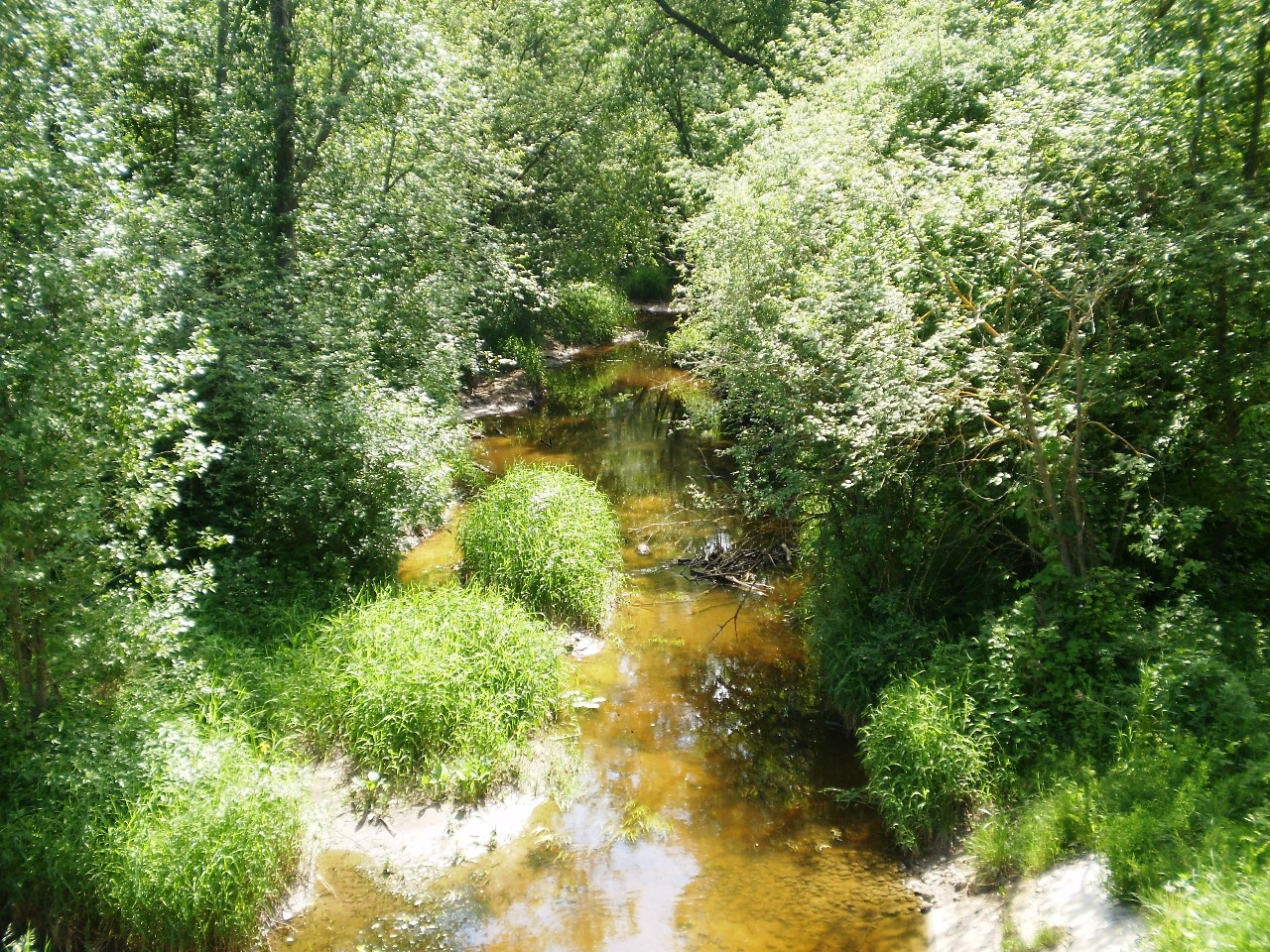 Smilga prie Tubių